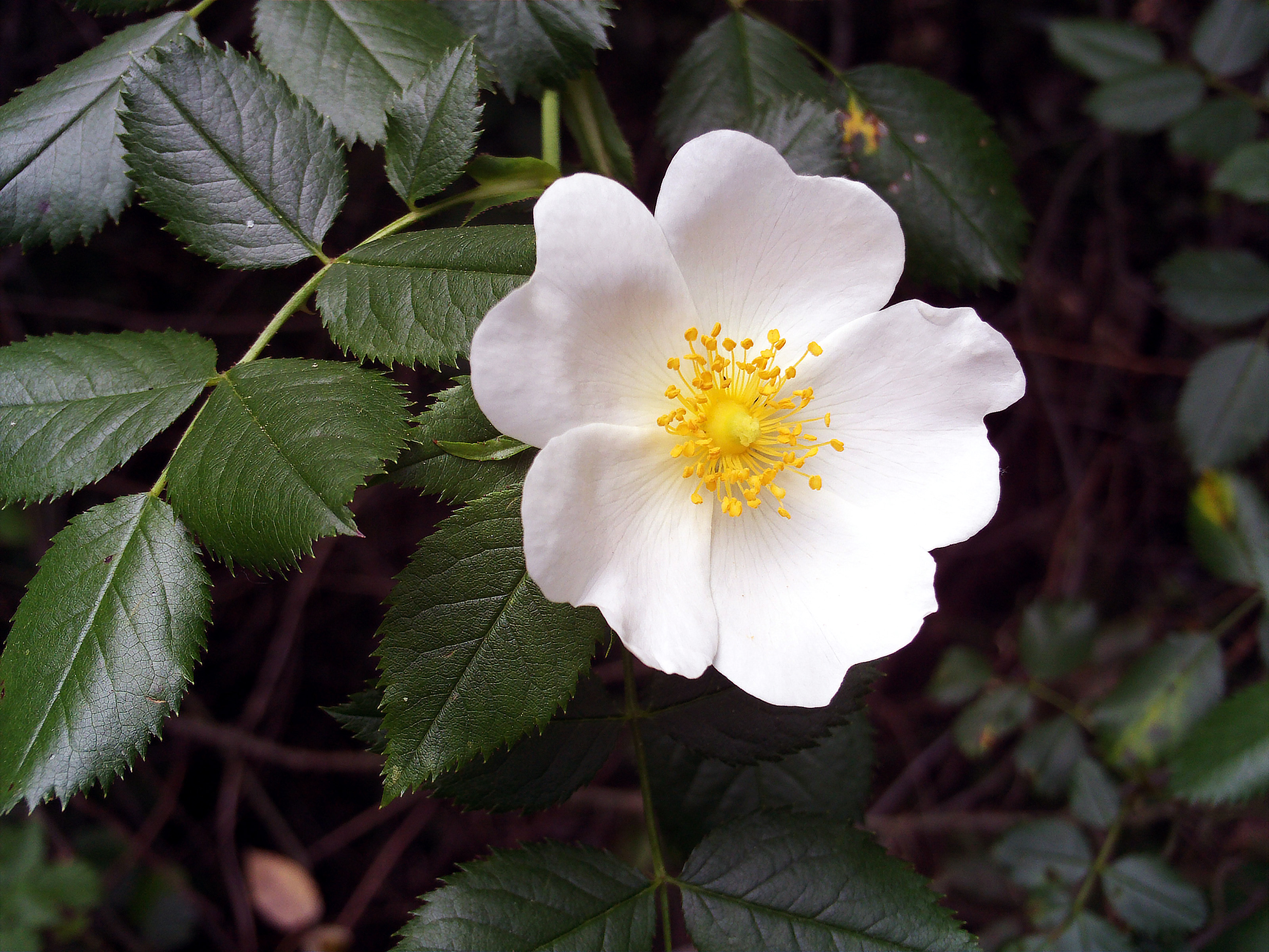 Rosa pouzinii Tratt. Flower Closeup Sierra Madrona, May 11, 2008